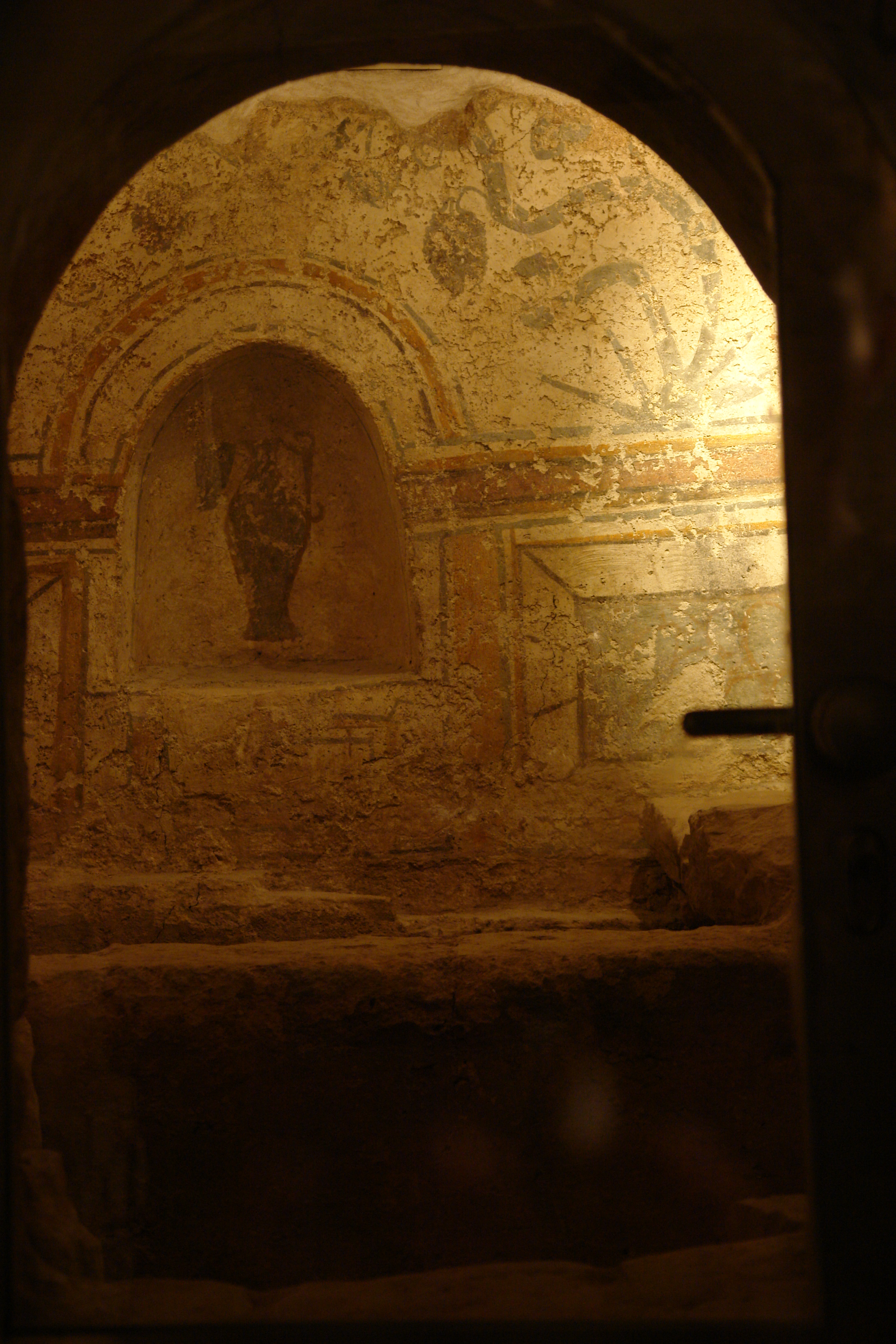 ókeresztény mauzóleum This is a photo of a monument in Hungary. Identifier: 18013